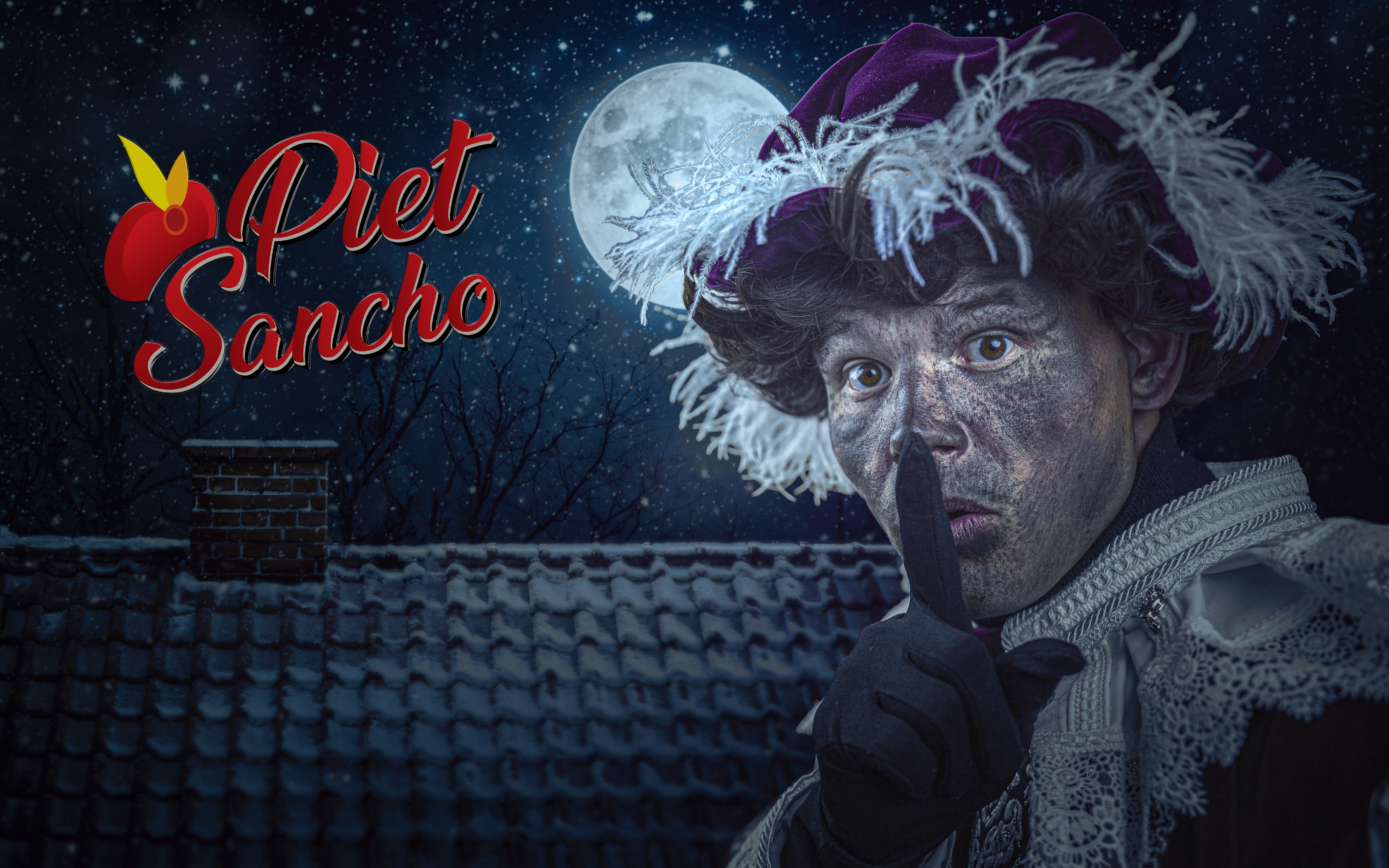 Piet Sancho vertolkt door Kevin Timmermans